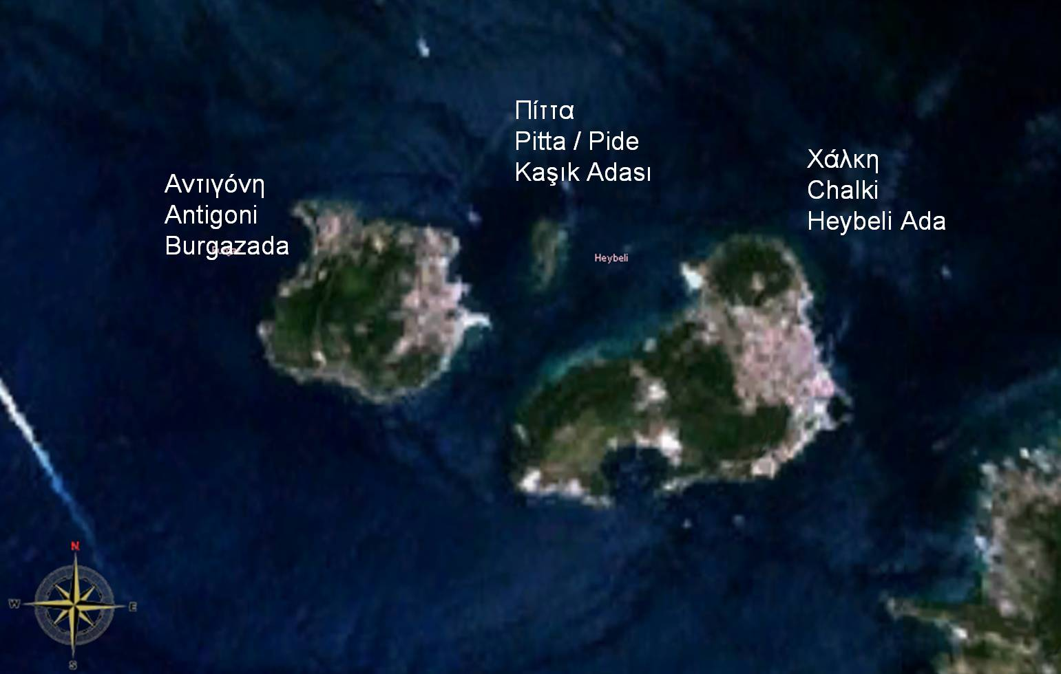 Antigoni, Pitta, Chalki islands (Turkey)